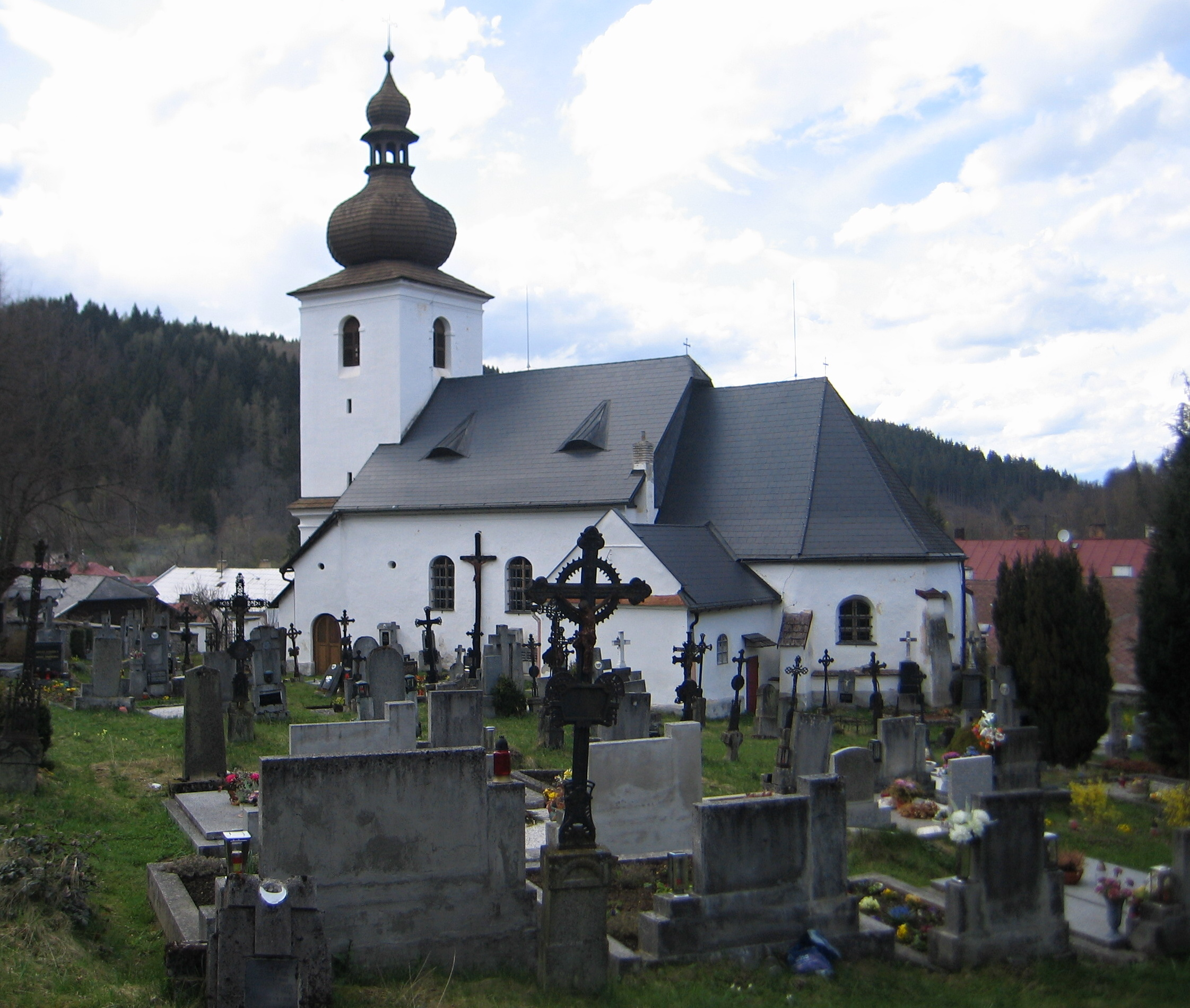 Kostel sv. Bartoloměje (Rejštejn), Rejštejn